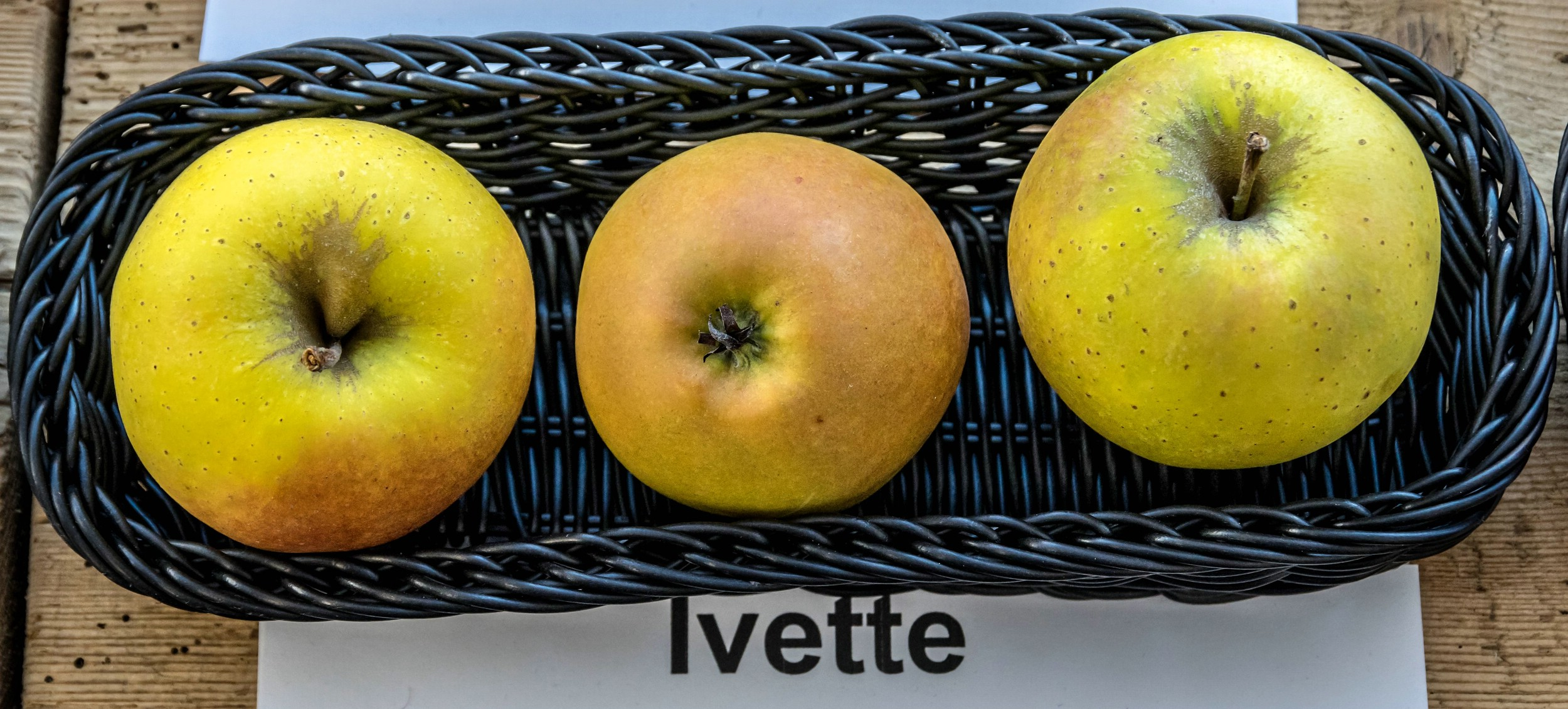 Alte Apfelsorten, von denen es im Badischen noch tragende Bäume gibt. Alle Aufnahmen au dem Oktober 2015